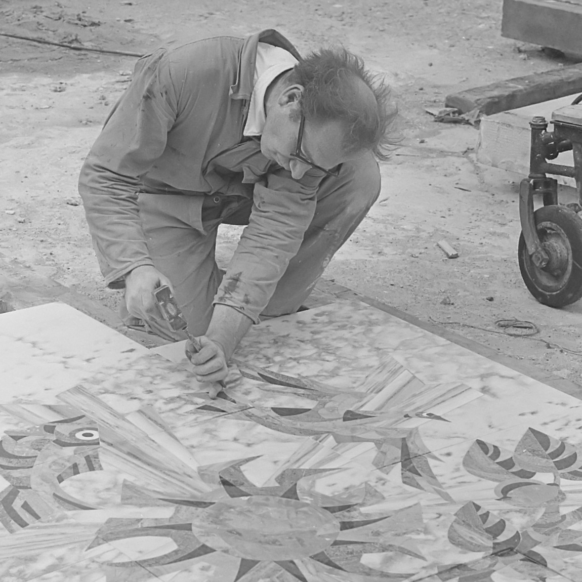 Marmer-inpersia van Pieter Wiegersma de uitvoerder legt de laatste hand aan het werk 27 september 1963